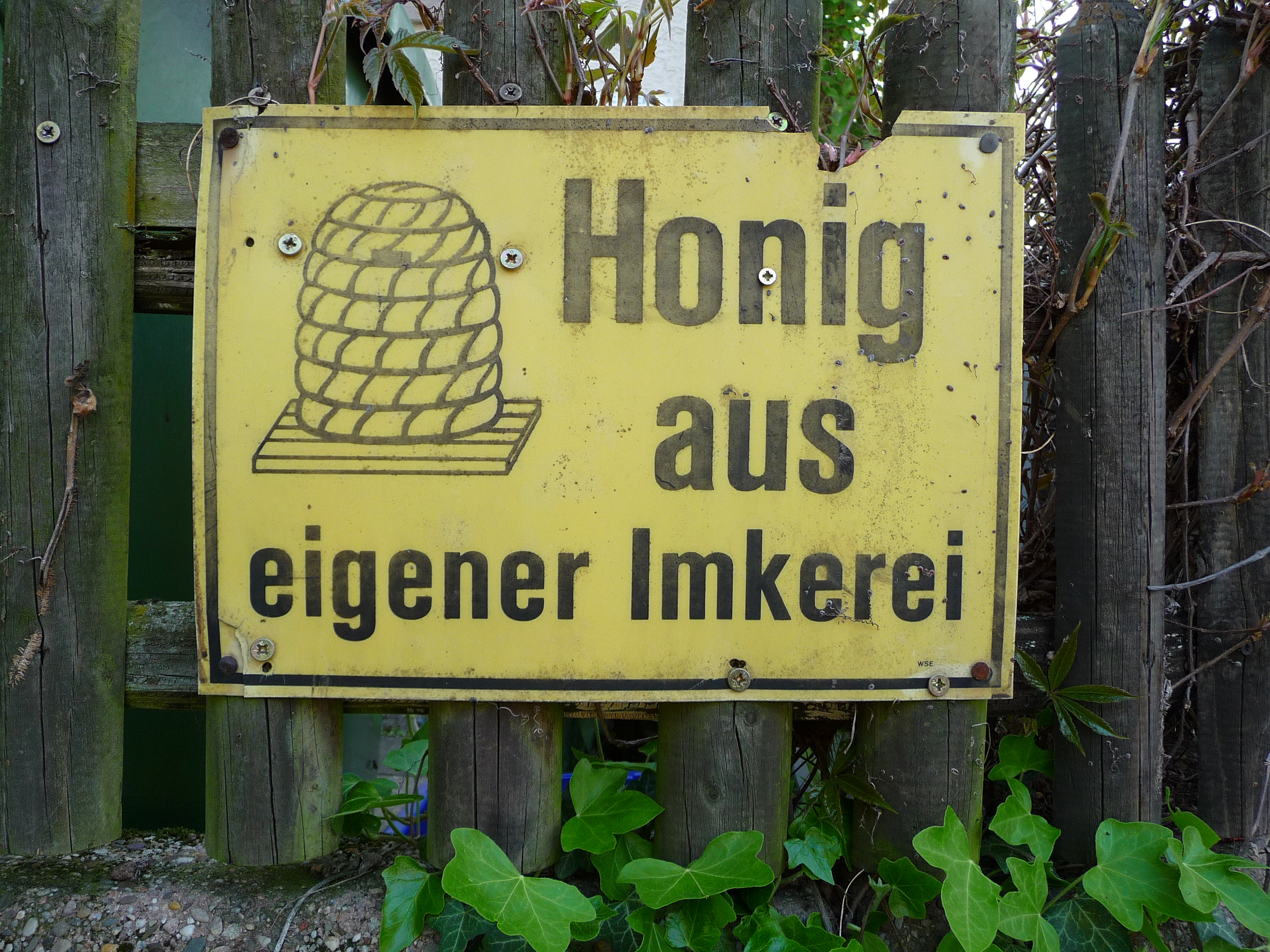 Werbeschild für Honig aus eigener Imkerei, fotografiert in Baden-Württemberg (Deutschland)